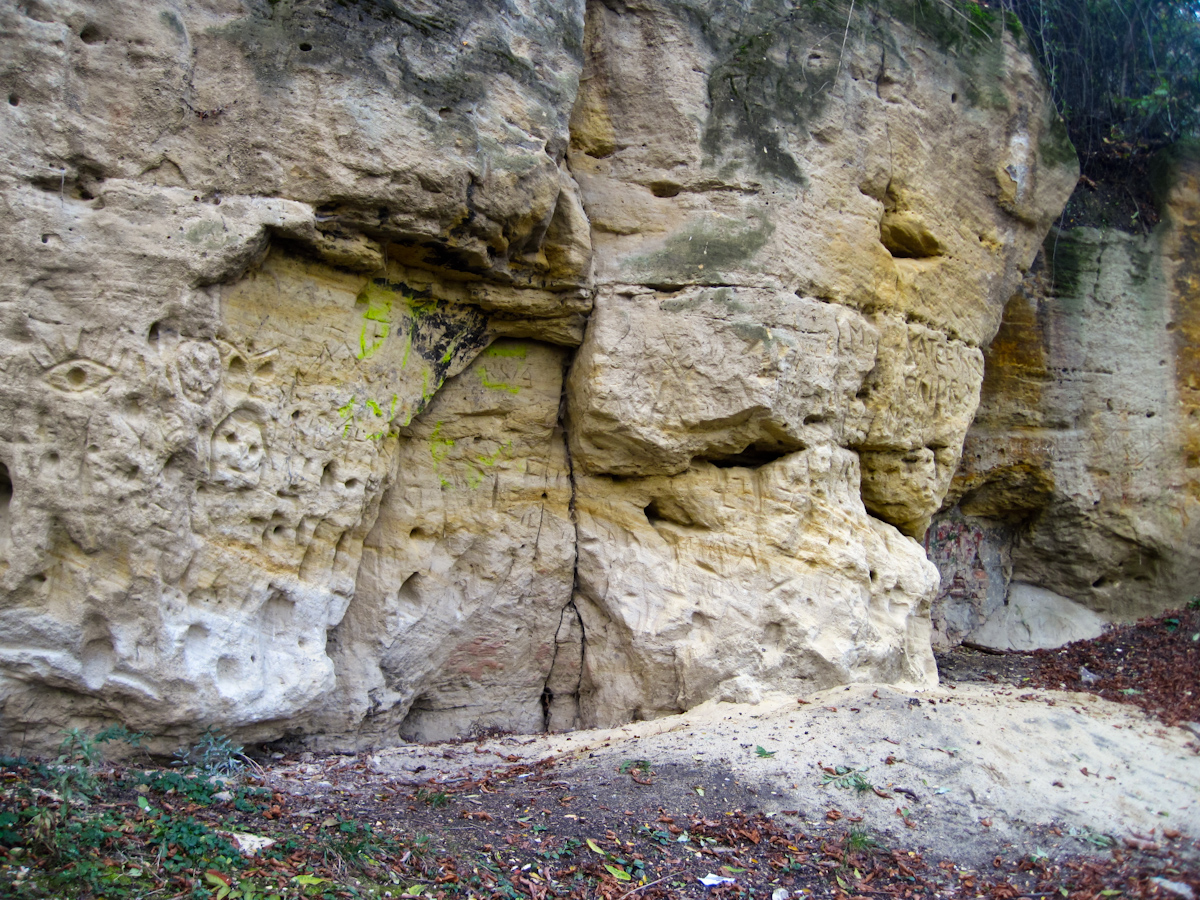 Prochazka v PP Prosecke skaly. Fotografie jsou urceny k ilustraci clanku o teto Prirodni pamatce.